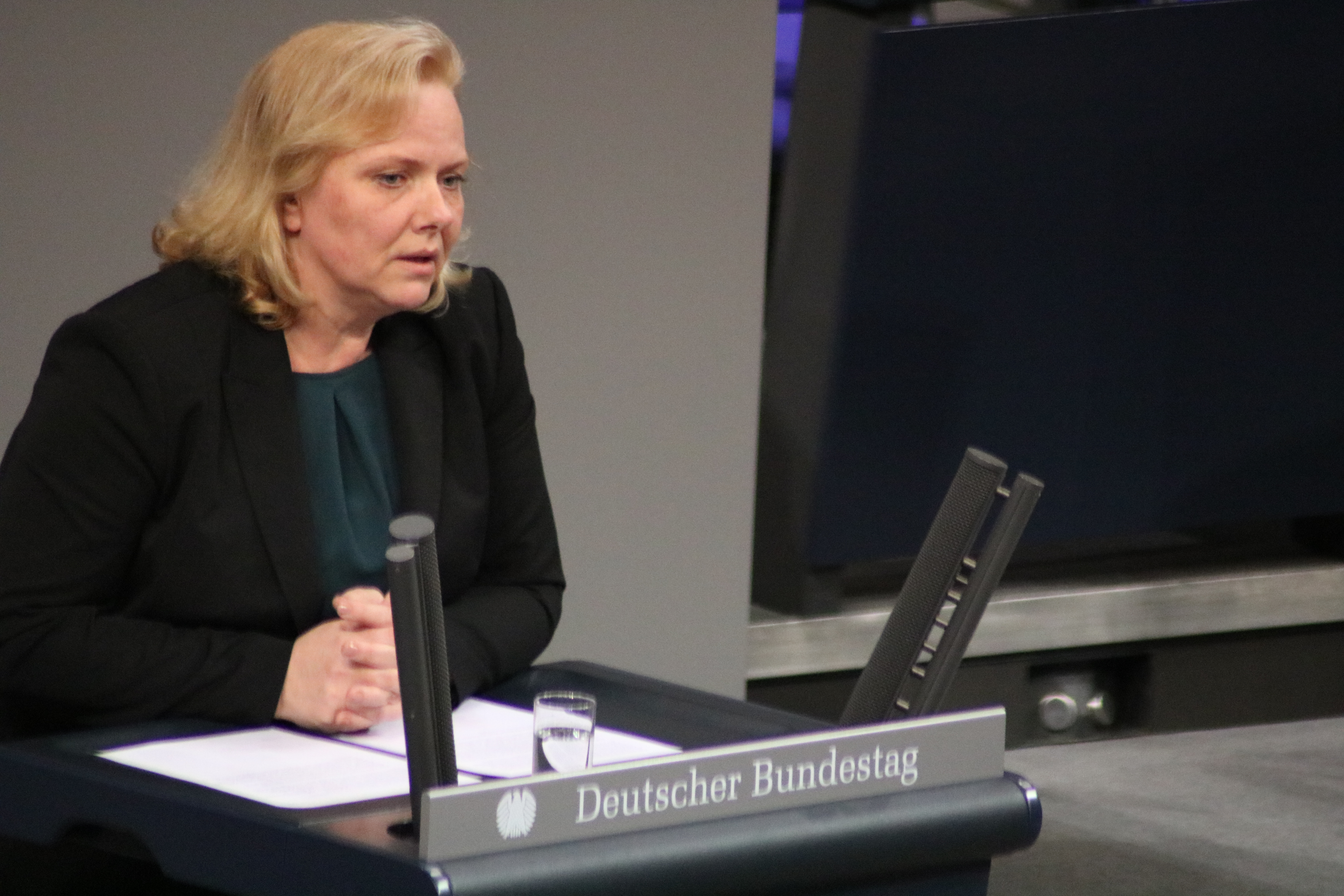 Ulrike Schielke-Ziesing bei ihrer Rede zur Doppelverbeitragung der betrieblichen Rente.